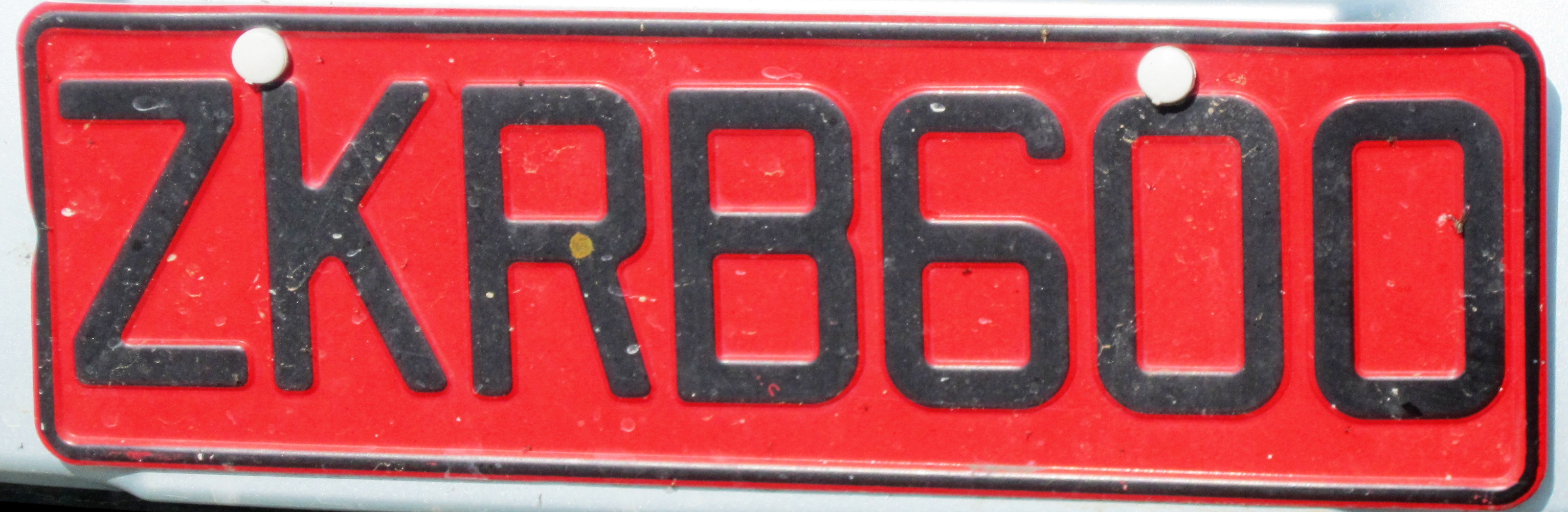 rode huur kentekenplaat Cyprus